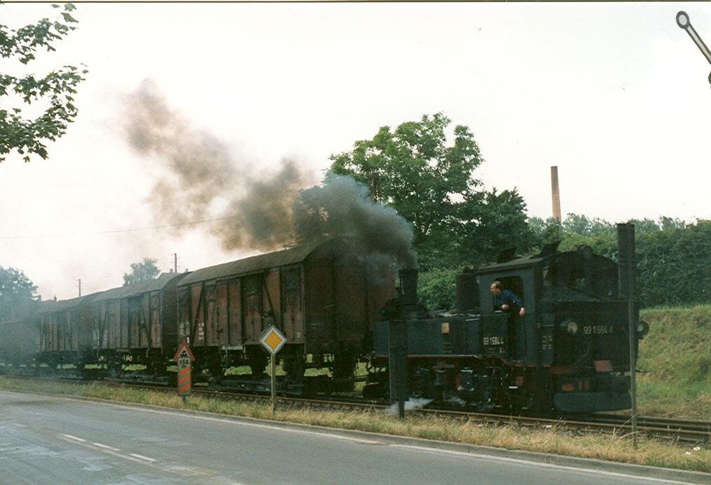 Güterzug im Dreischienengleis vor dem Bahnhof Oschatz